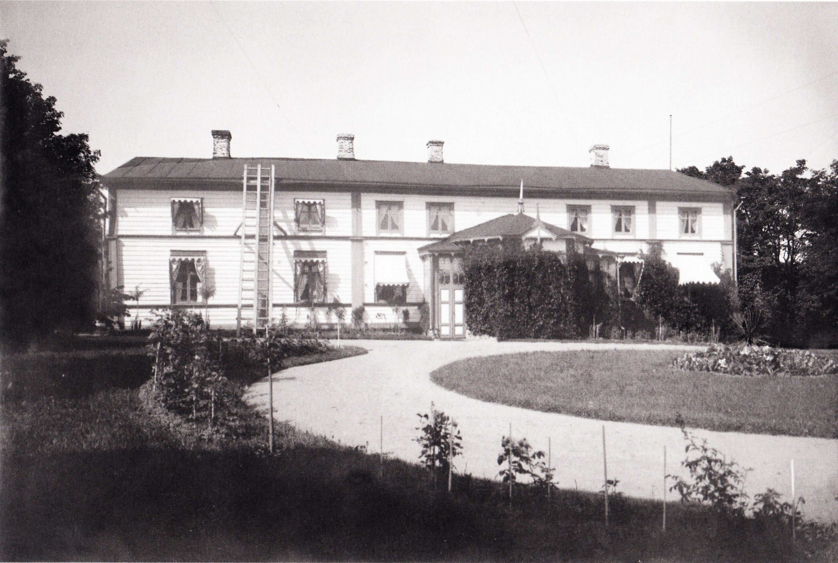 Hahkialan kartano